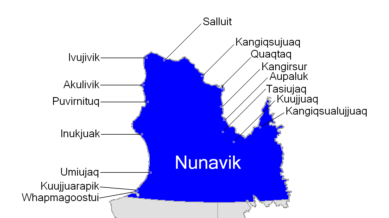 Карта розташування сіл на території Нунавіку